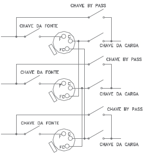 Diagrama RT delta fechado